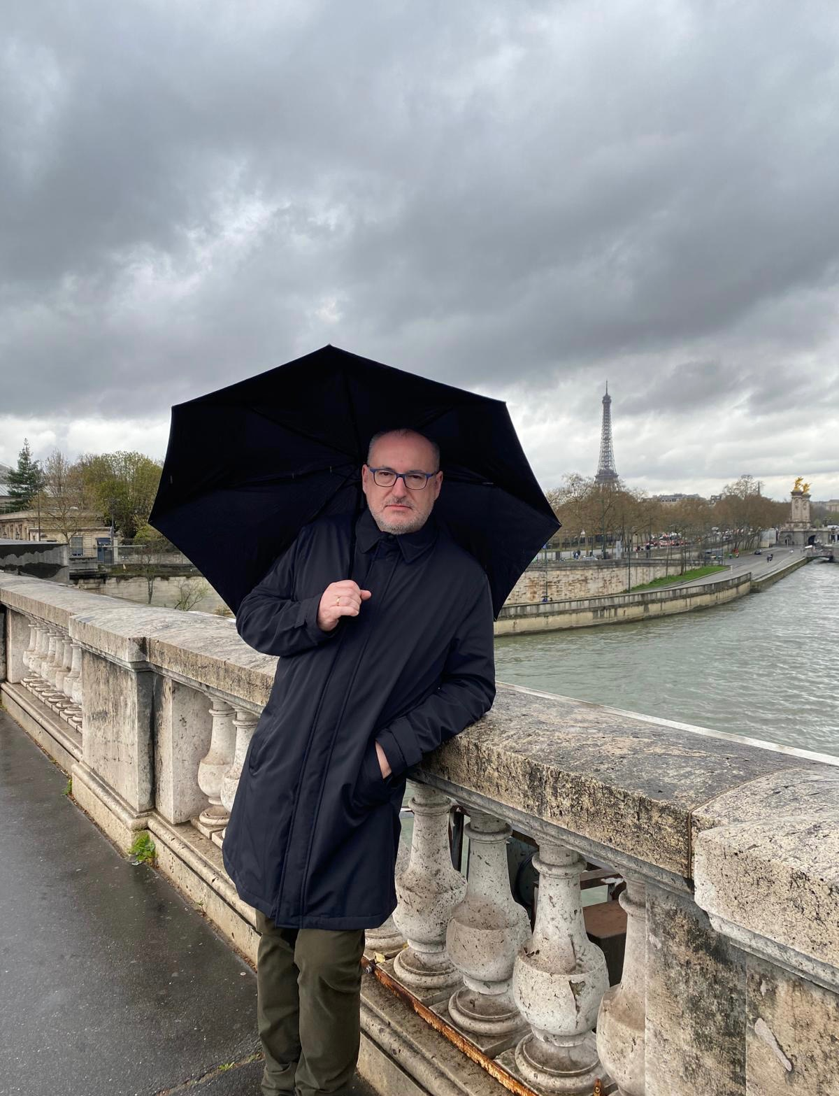 Bruno Marcos en el Café Martinho de Arcada, Praça do Comércio, Lisboa